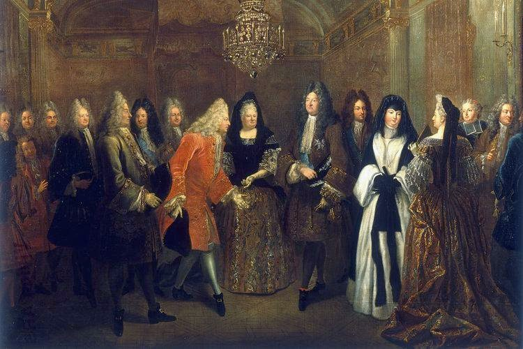 König Ludwig XIV. empfängt den späteren König von Polen und Kurfürsten von Sachsen III. in Fontainebleau. Von 1711 bis 1719 befand sich der Kurprinz auf seiner Kavallierstour durch Europa. Im Herbst 1714 machte er in Paris Station. Rechts Ludwig XIV., in der Mitte dessen Schwägerin Liselotte Herzogin von Orléans, links August. Dies war einer der letzten großen Empfänge des französischen Königs.